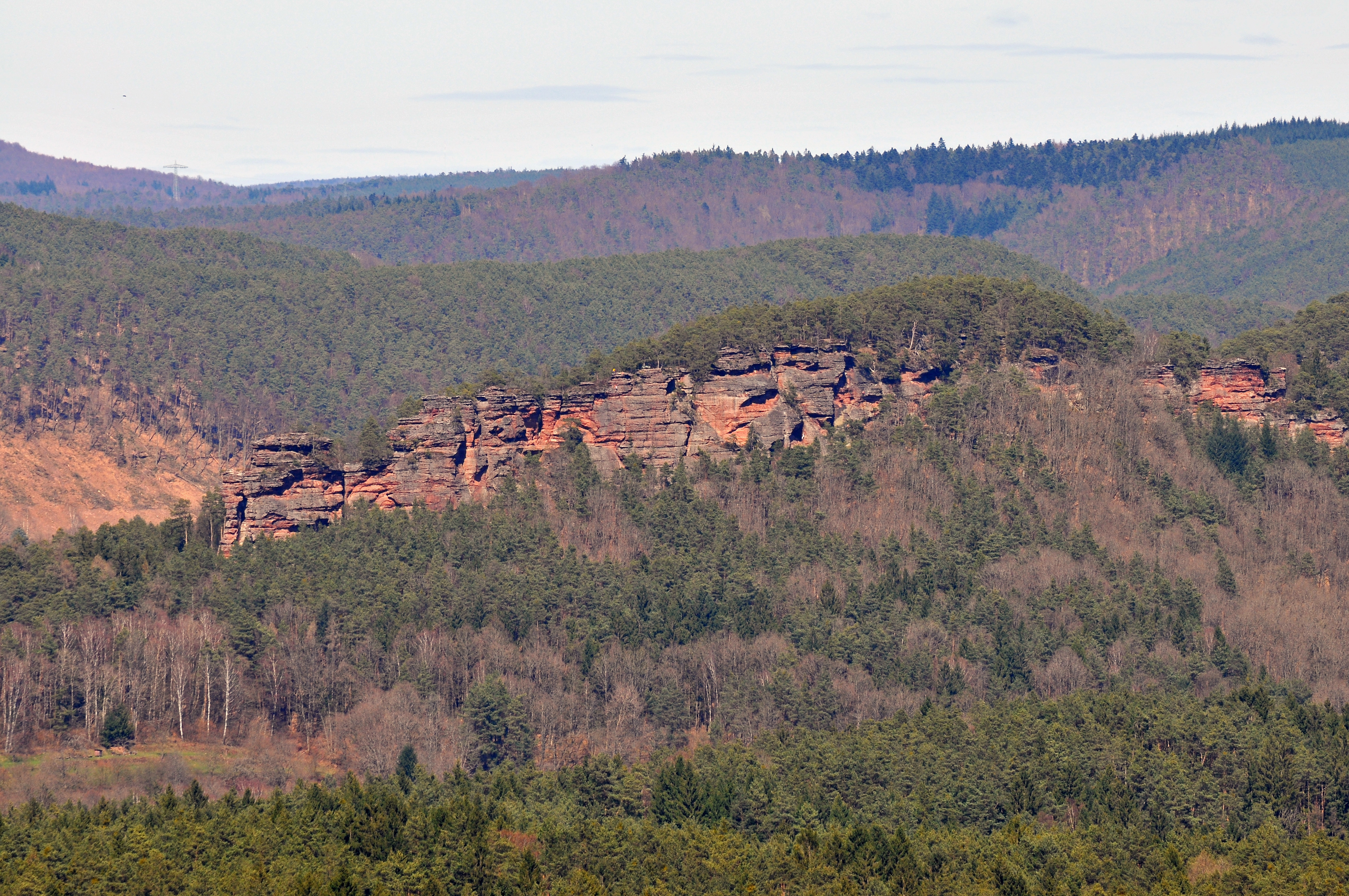 Die Felsengruppe Hochstein mit dem westlichen und dem östlichen Massiv. Das Bild wurde vom Napoleonfels aufgenommen.